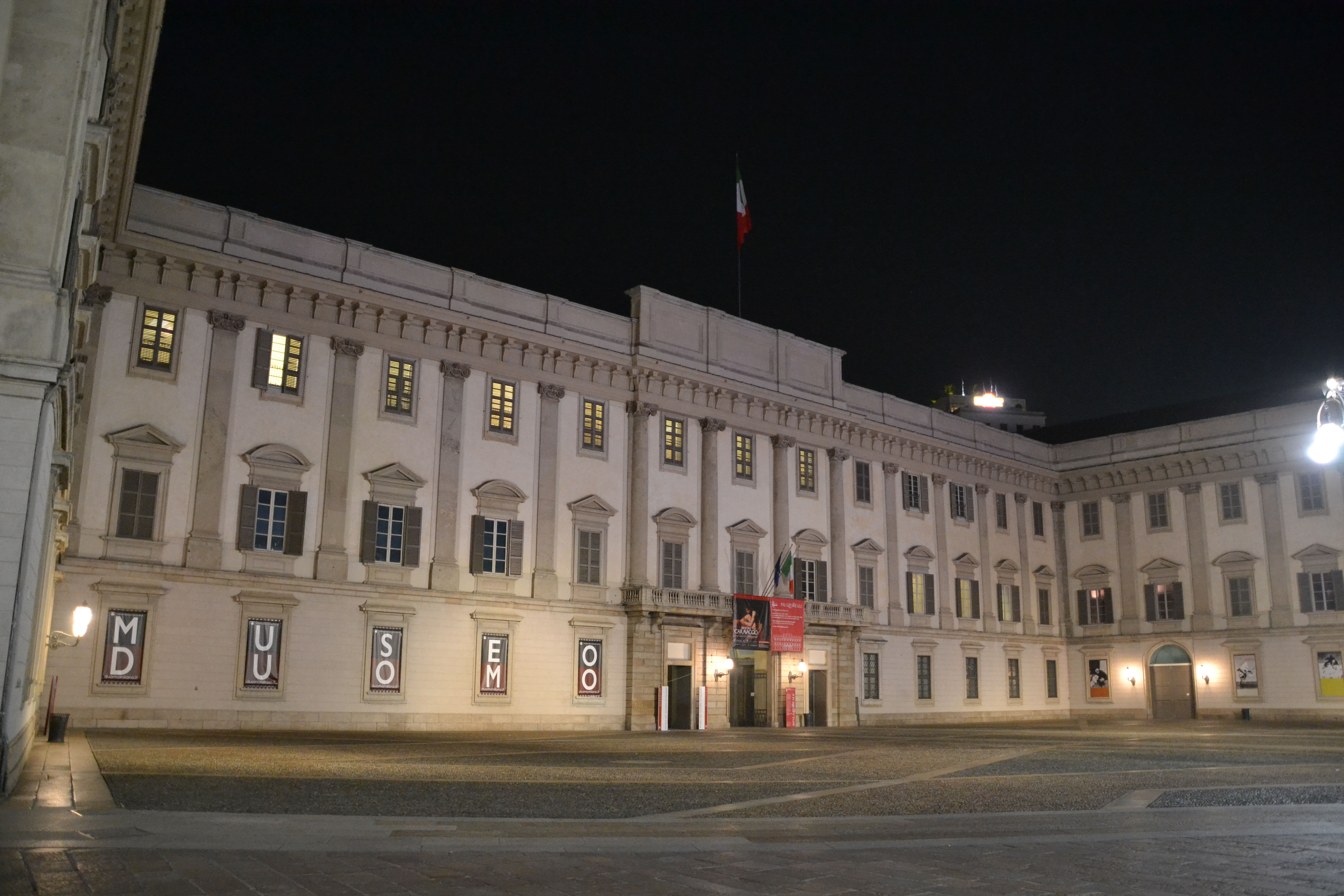 Ingresso del Palazzo Reale di Milano (Notturno) This is a photo of a monument which is part of cultural heritage of Italy.